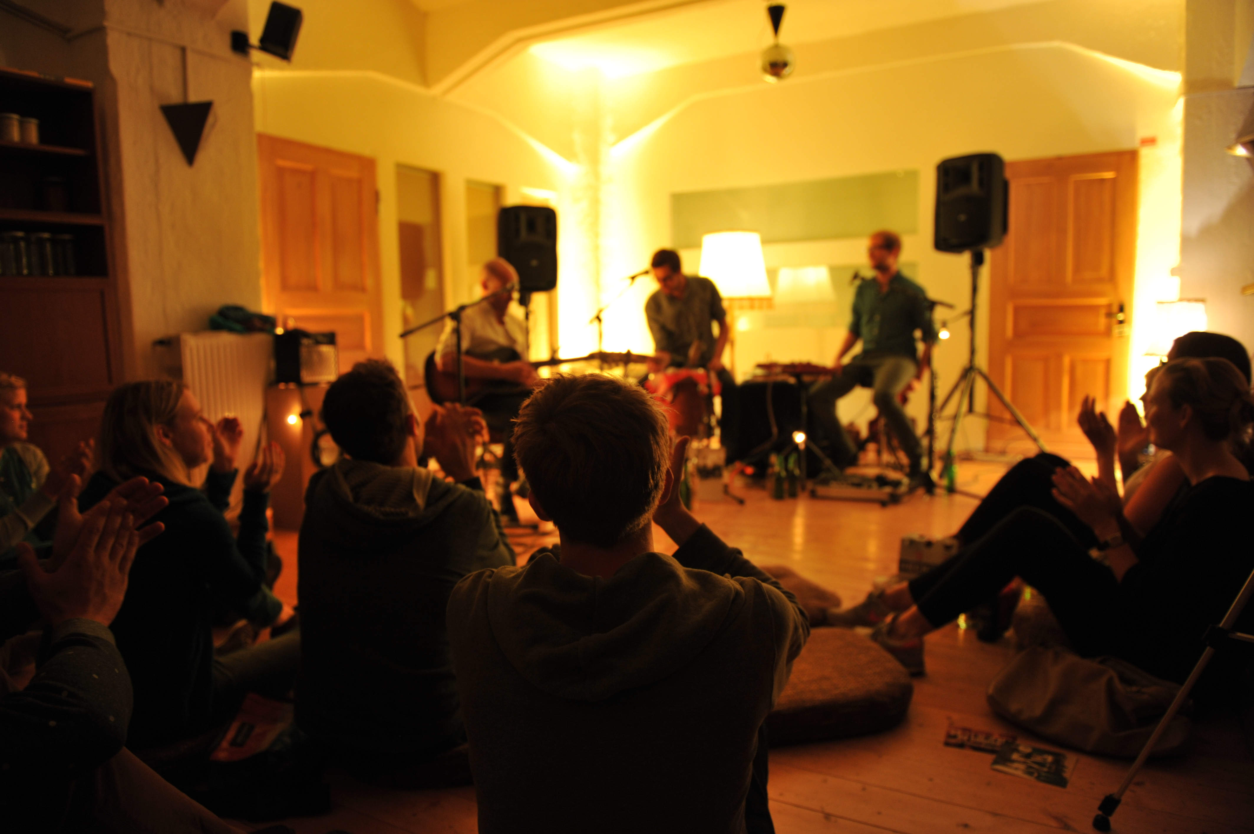 Exemple de Sofa concert